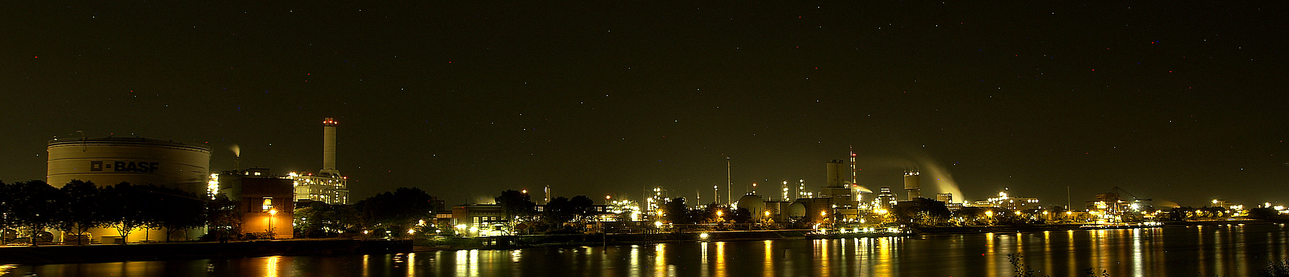 HDRI-Panorama der BASF in Ludwigshafen von Mannheim (Friesenheimer Insel) aus gesehen